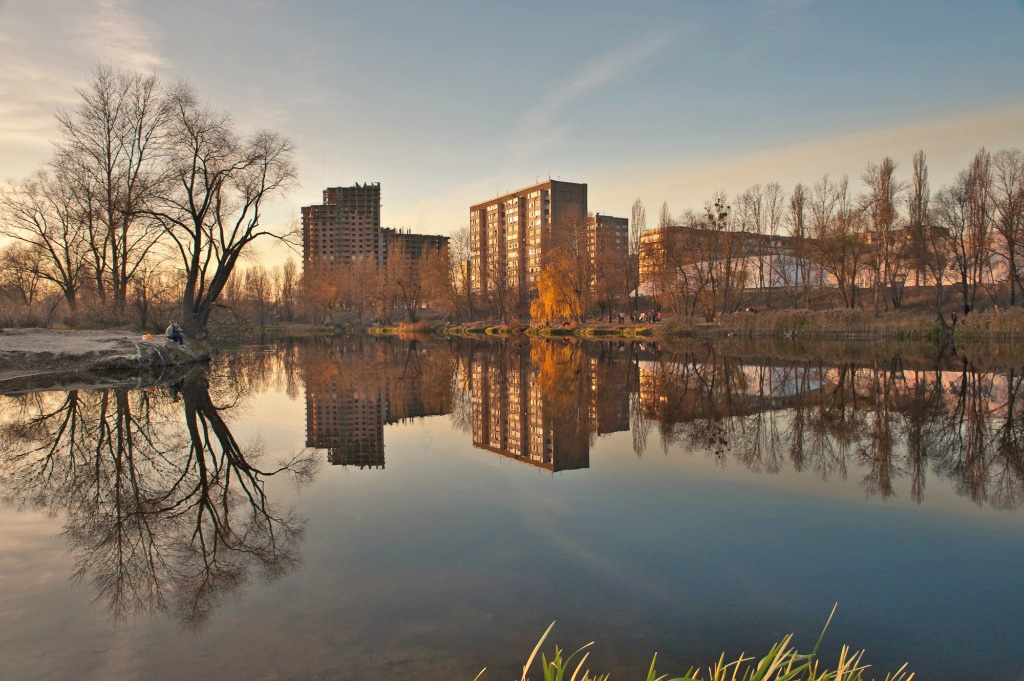 озеро Вербне, Оболонський район